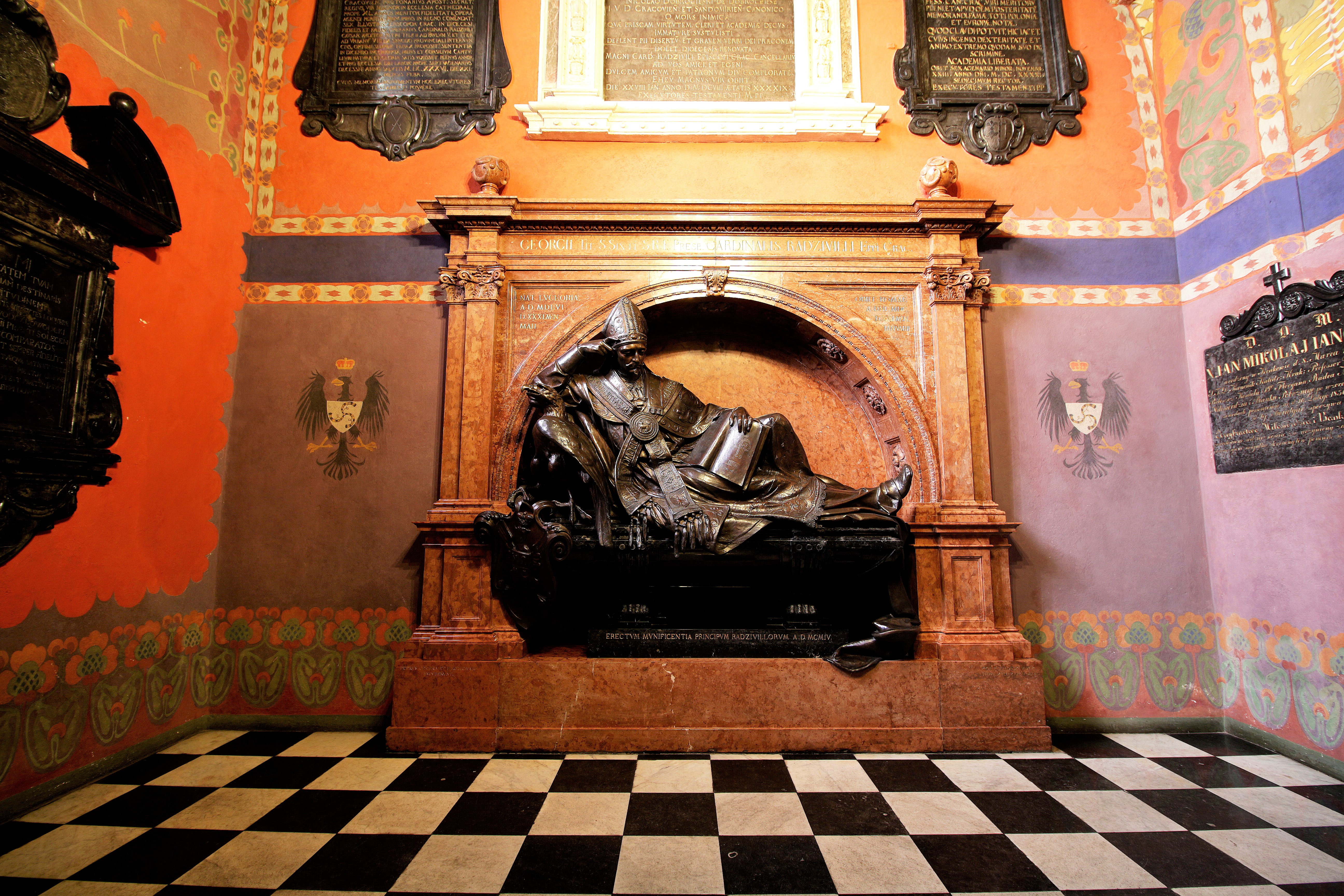 Kraków, Kaplica Szafrańców na Wawelu, pomnik kardynała Jerzego Radziwiłła